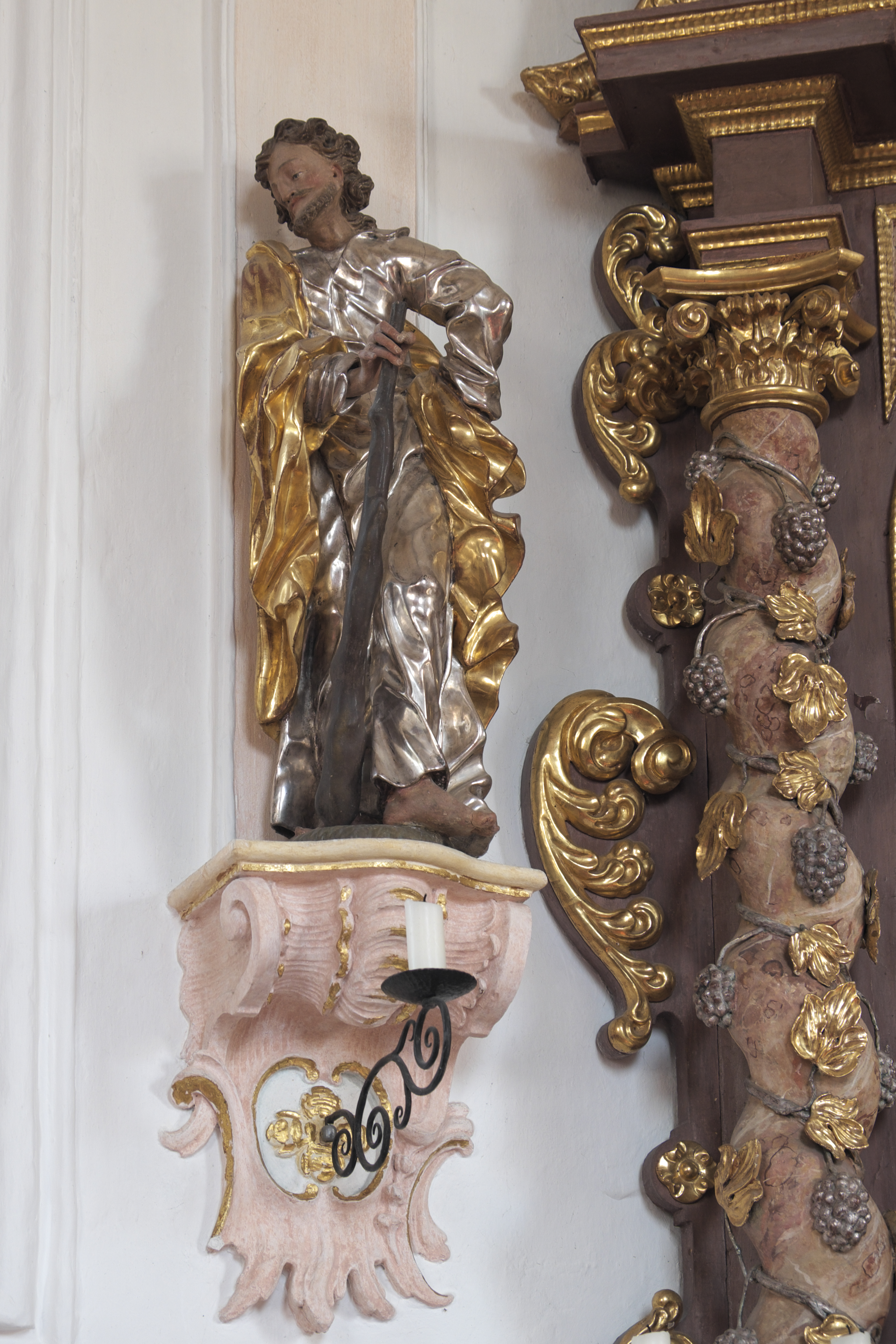 Katholische Pfarrkirche St. Johannes Baptist in Zankenhausen (Türkenfeld) im Landkreis Fürstenfeldbruck (Bayern/Deutschland), Apostelfigur aus der Werkstatt von Lorenz Luidl, von 1710/20